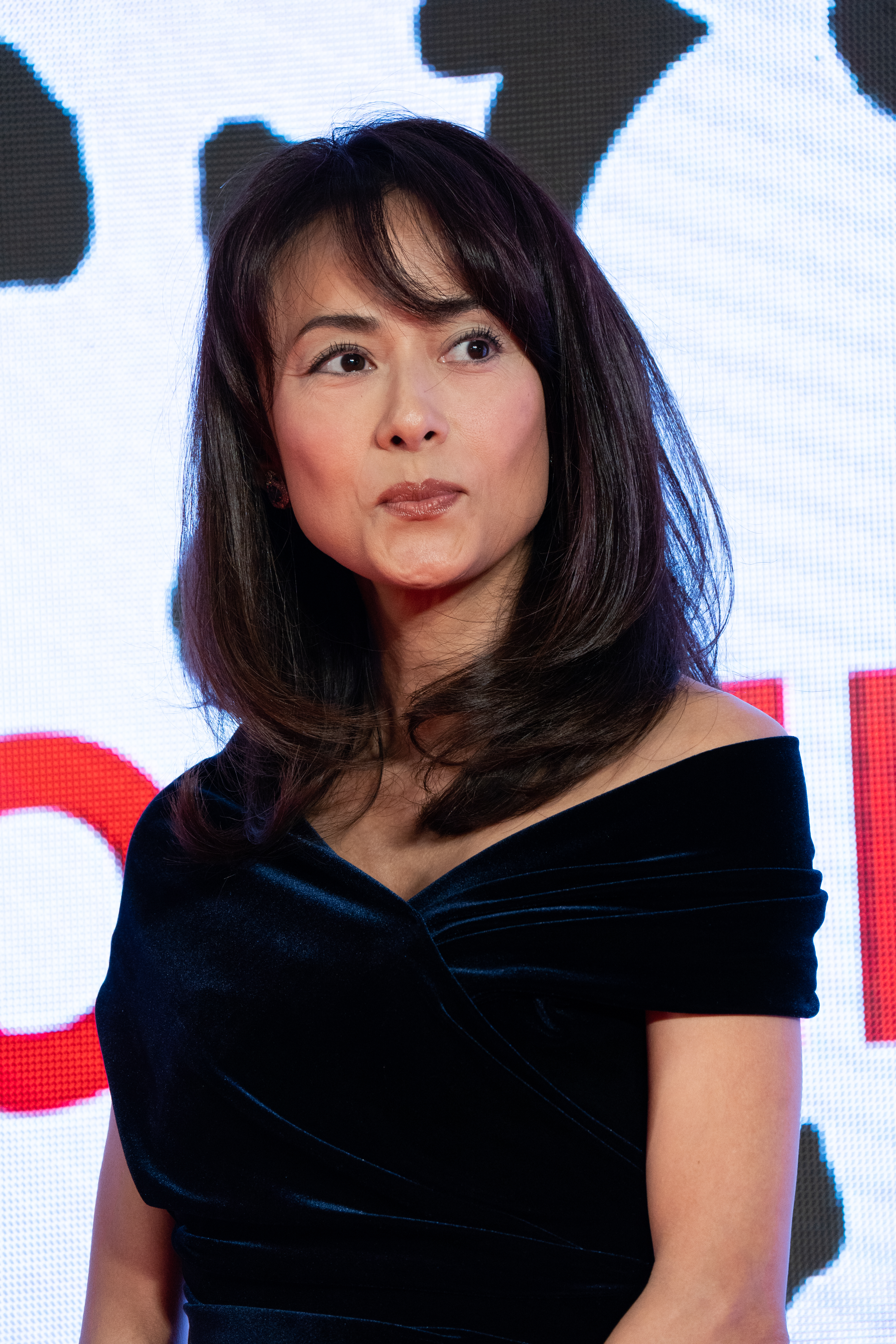 第32回 東京国際映画祭 オープニングセレモニー 後藤久美子 (男はつらいよ お帰り 寅さん)